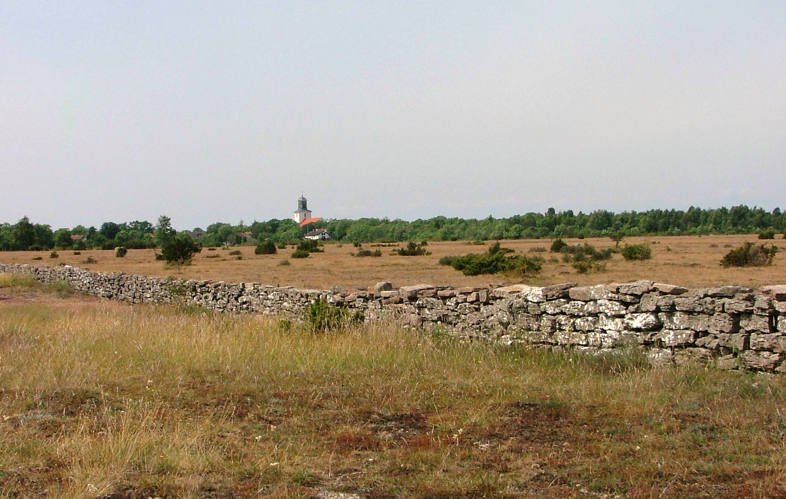 Stora Alvaret vid Resmo.